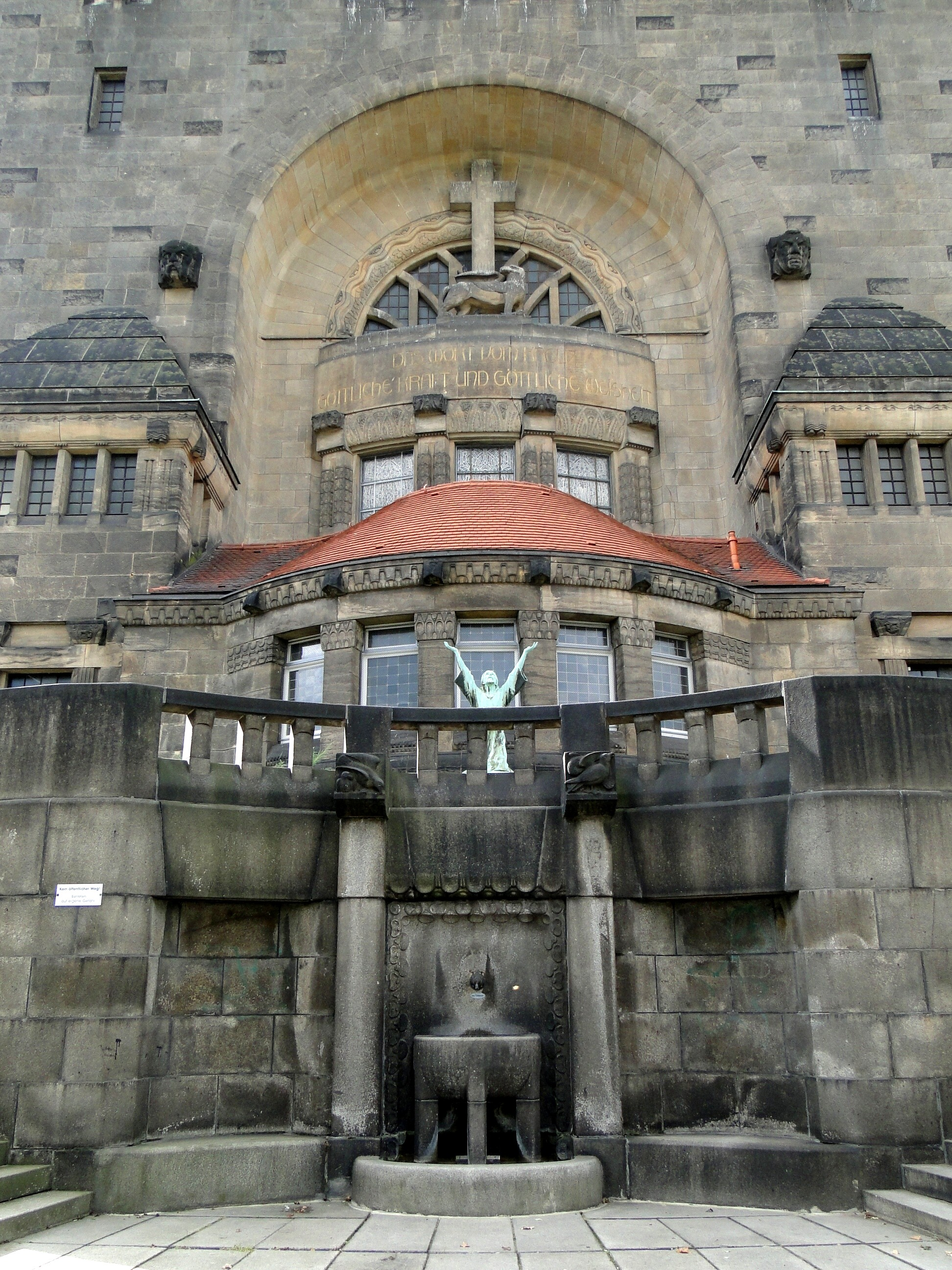 Brunnen der Christuskirche in Dresden